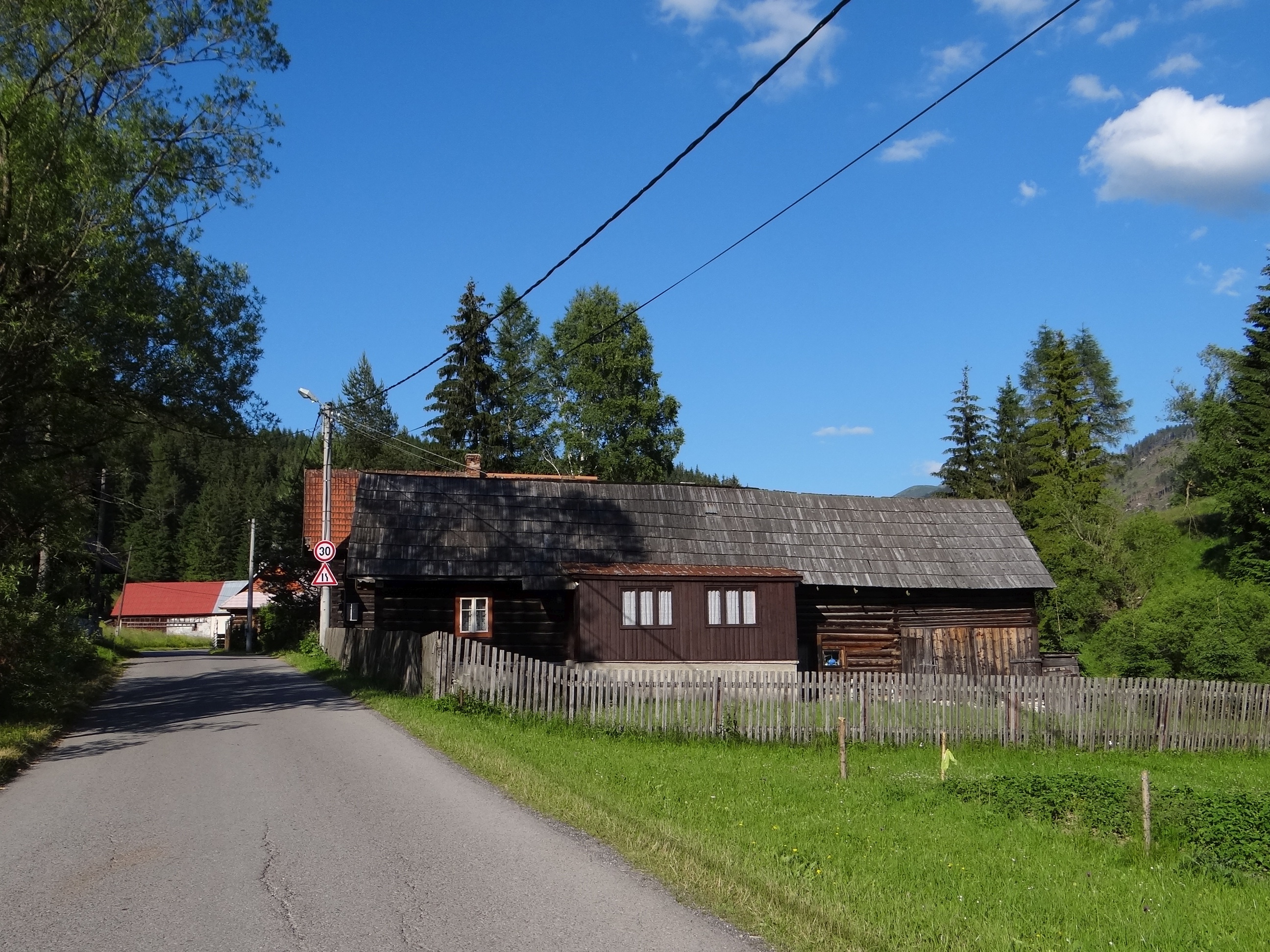 Tadycyjne domy w Hutach